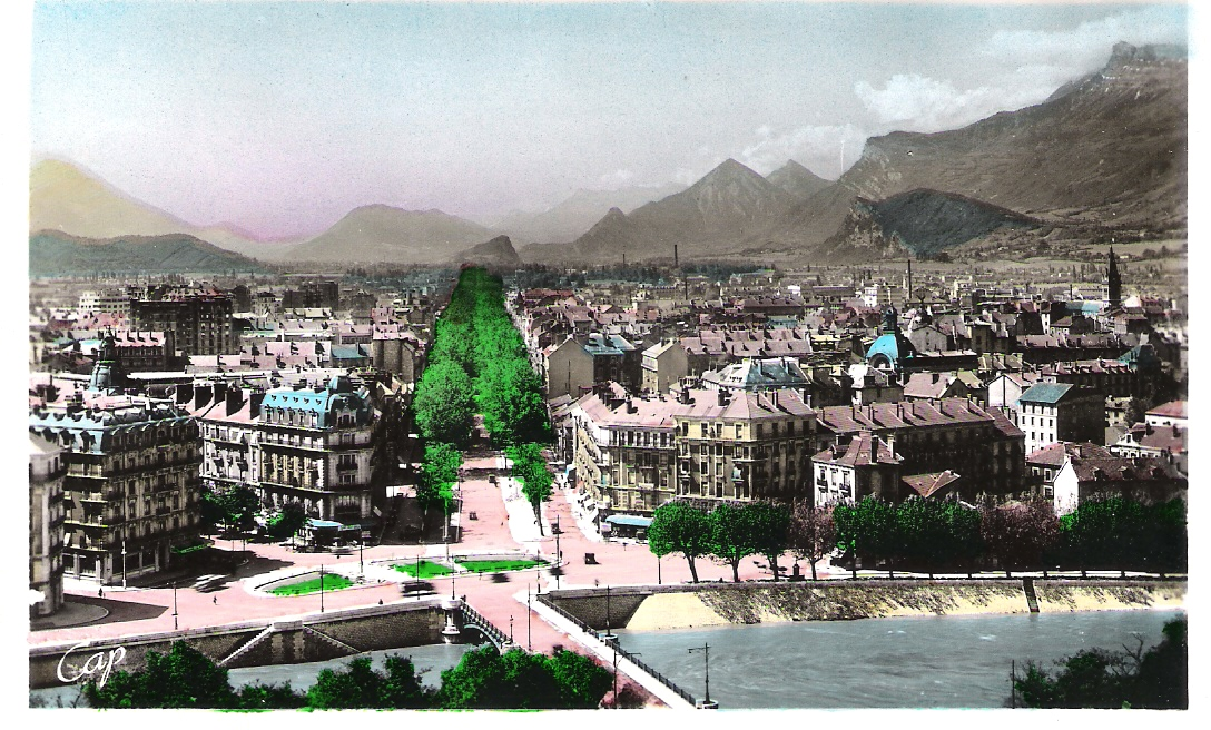 Grenoble, carte 49 -real photo